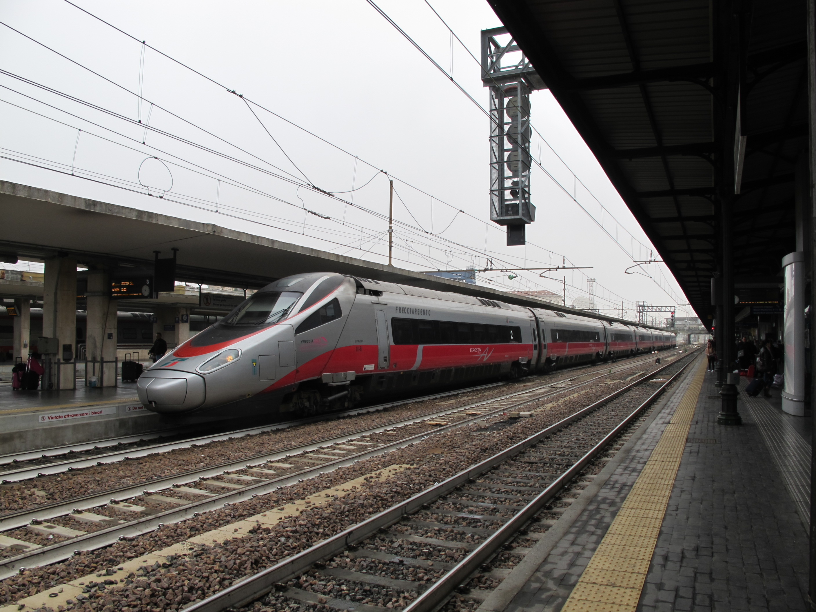 ETR 600 als Frecciargento in Bologna